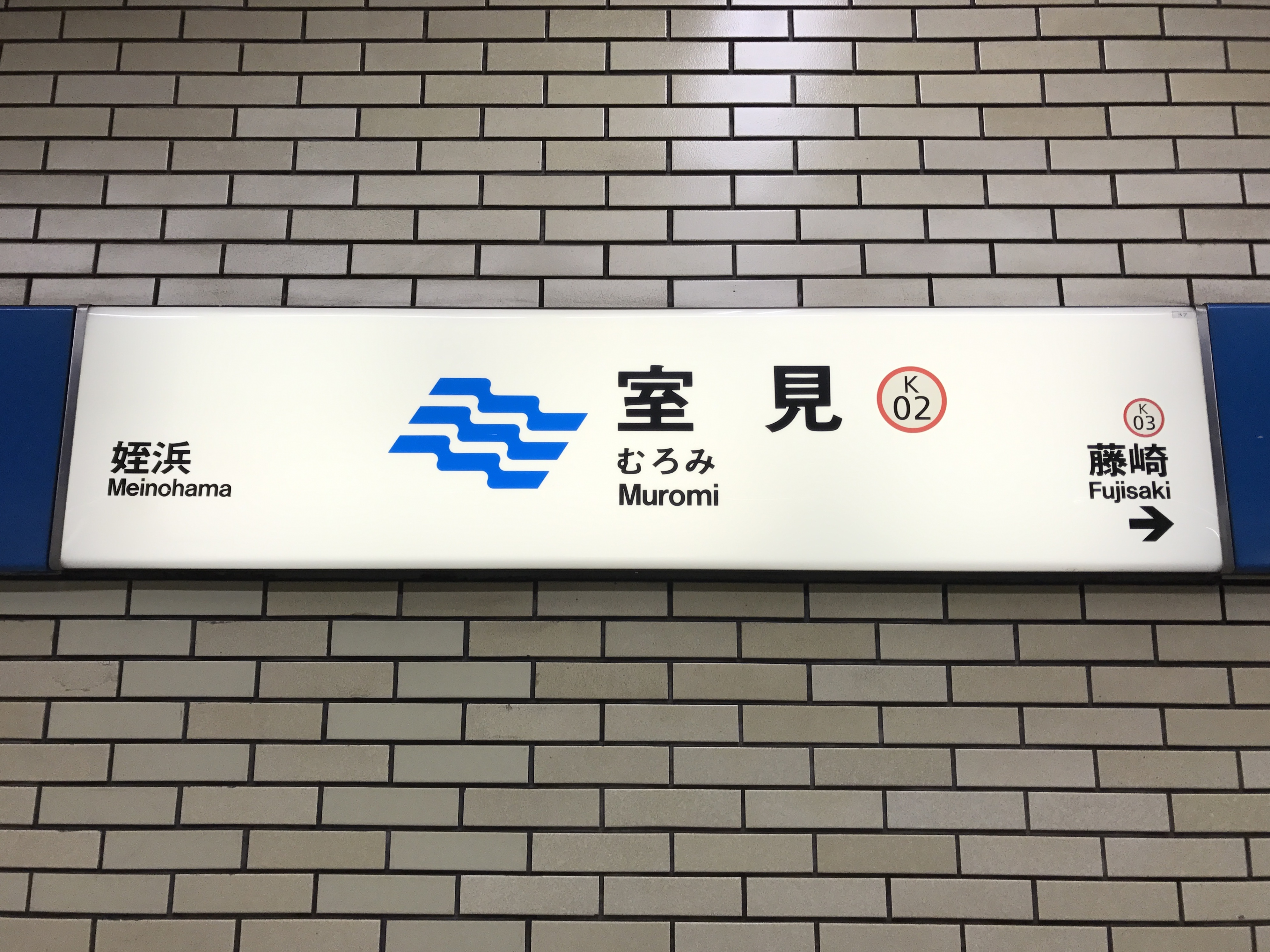 室見駅の駅名標。イラストは室見川